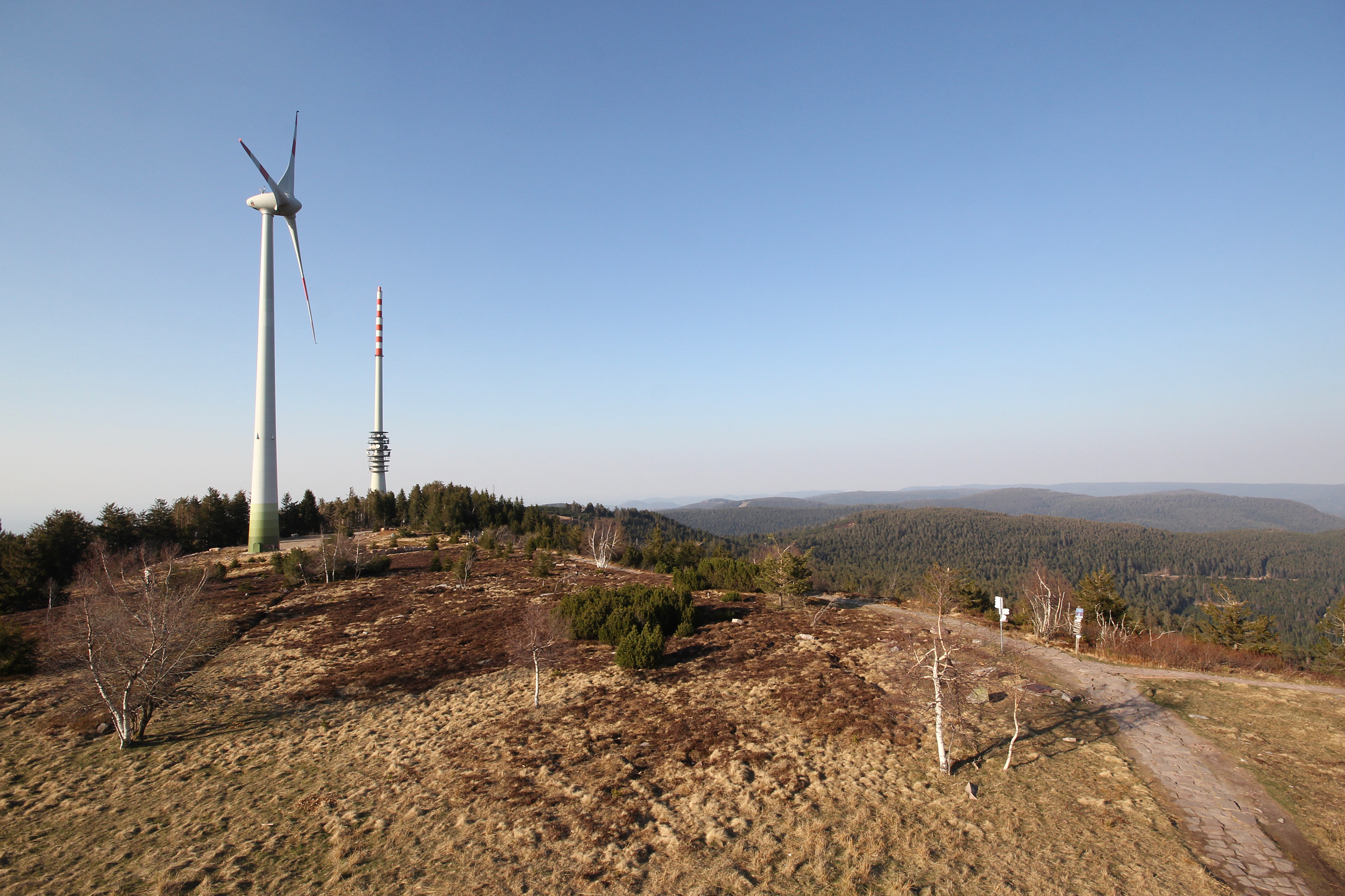 Gipfelplateau der Hornisgrinde im Nordschwarzwald, Baden-Württemberg. Gut sichtbar die Windenergieanlage und der SWR-Sendemast Hornisgrinde